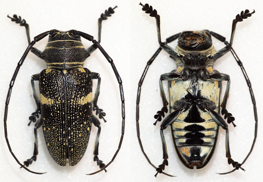 Bertoloni,1849 Sex: Female Data: 02-2013 - Morogoro Region - Lukuredi Village - Tanzania Size: ?